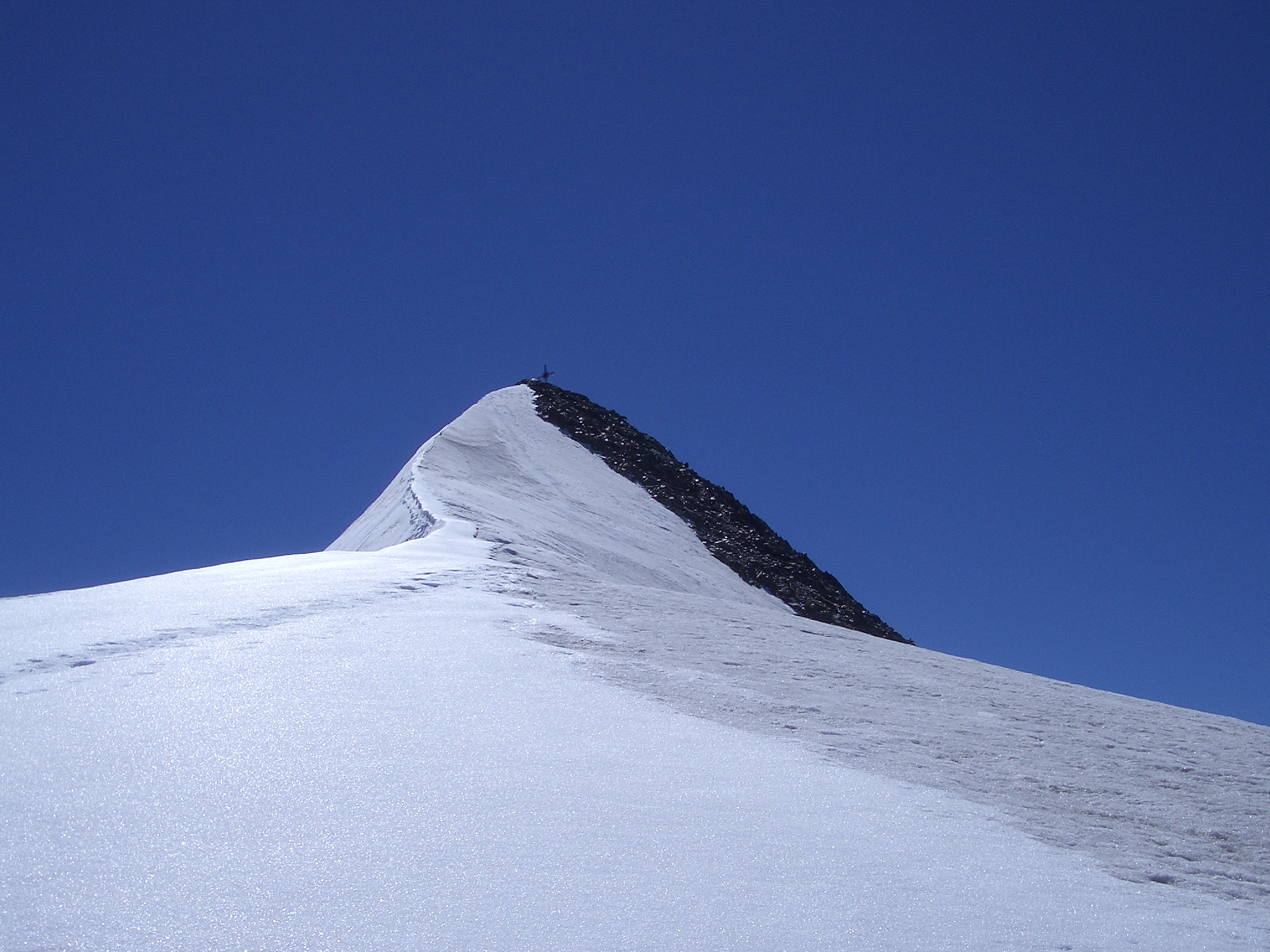 Schalfkogel von Norden.